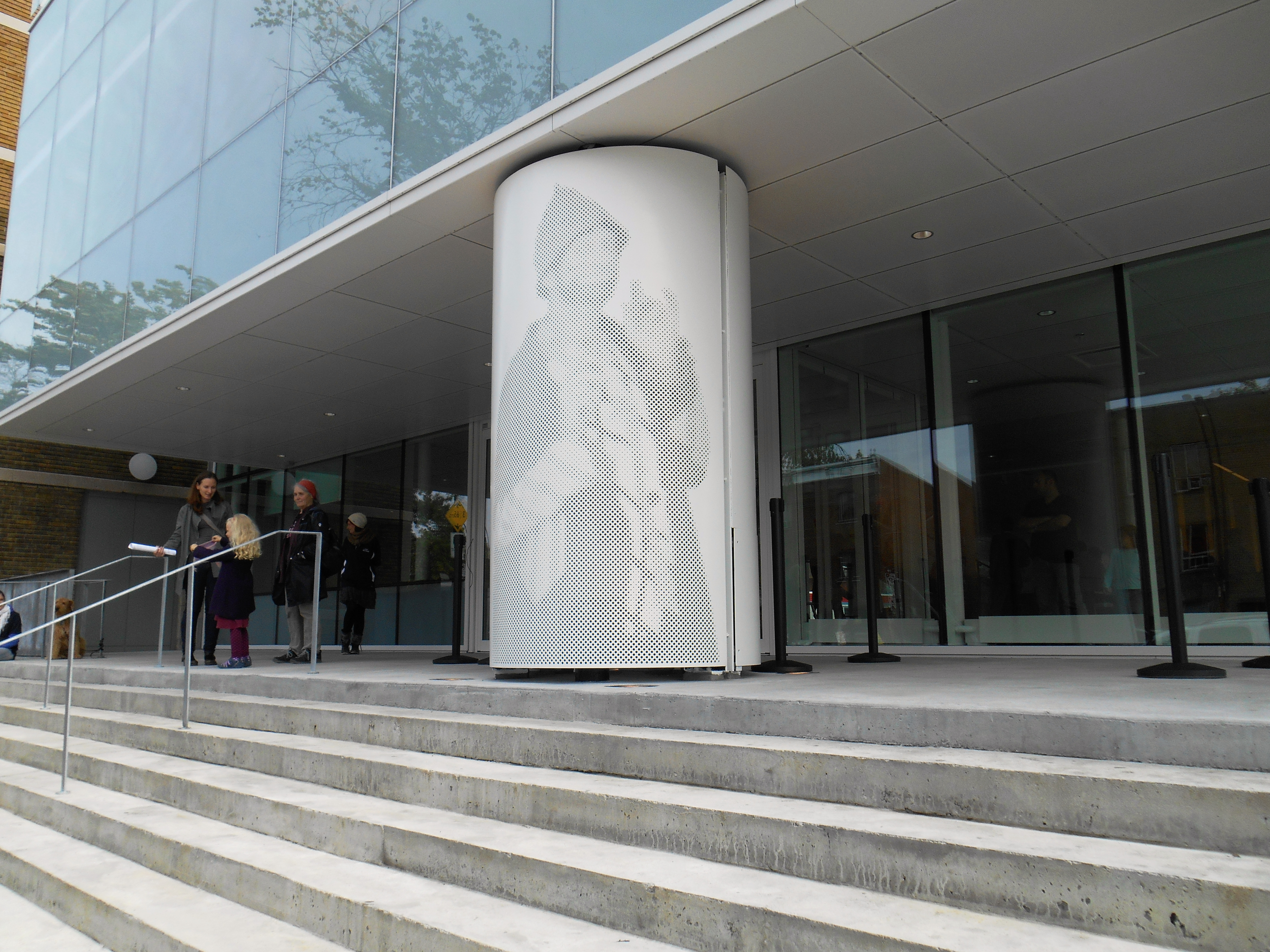 Bibliothèque Marc-Favreau, 500, boulevard Rosemont, Montréal, à deux pas de la station de métro Rosemont.